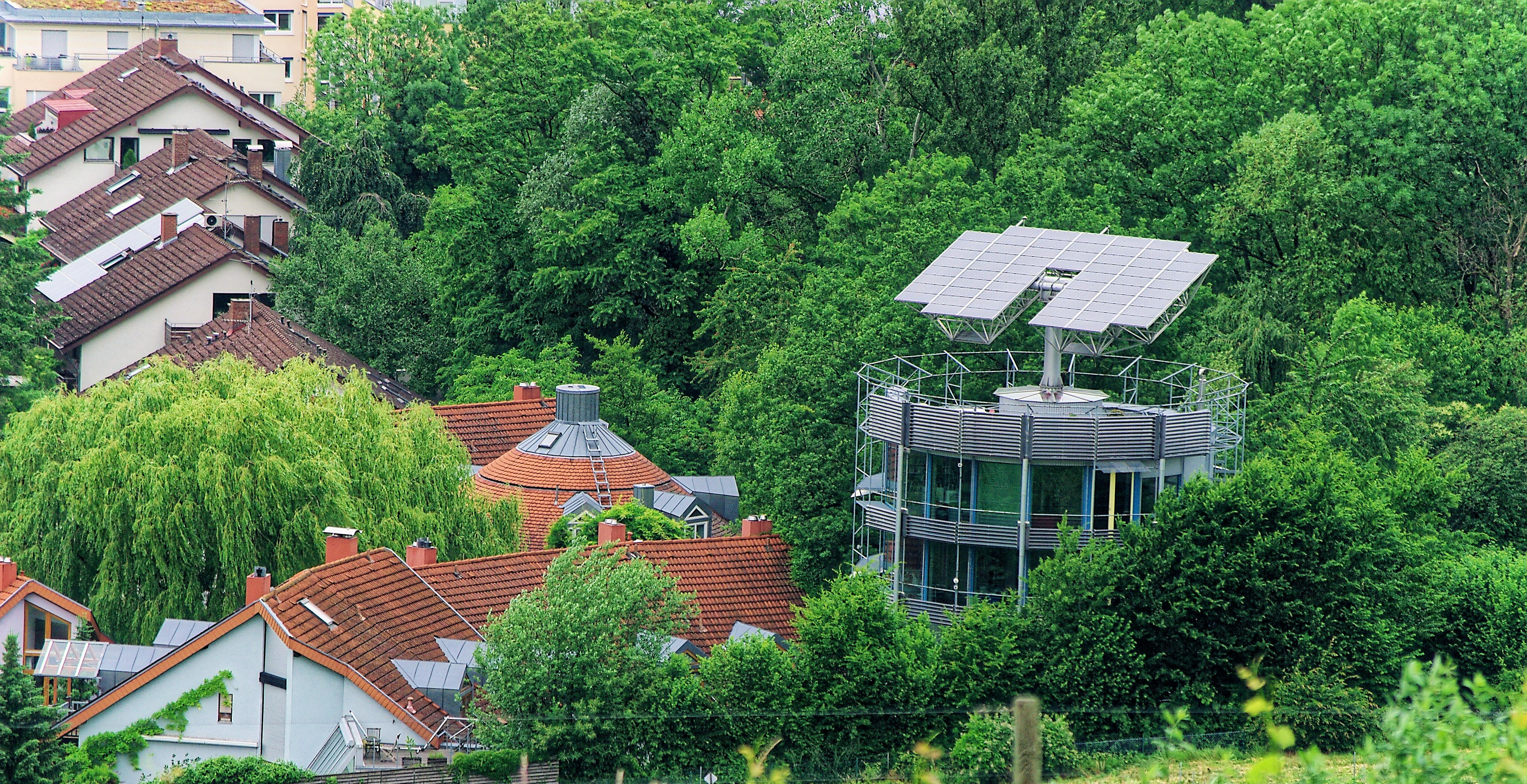 Heliotrop Stellung gegen 12 Uhr